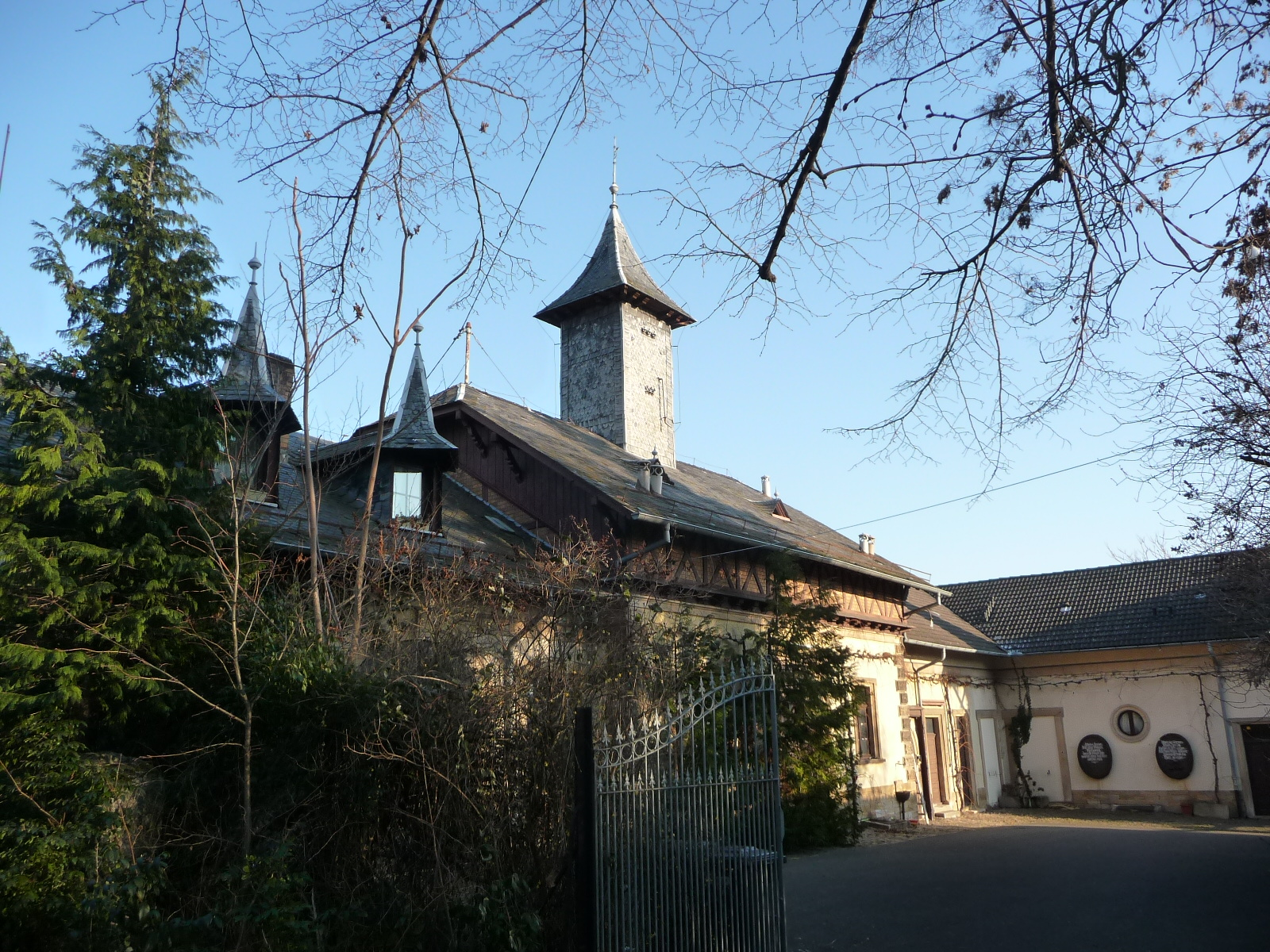 Deidesheim